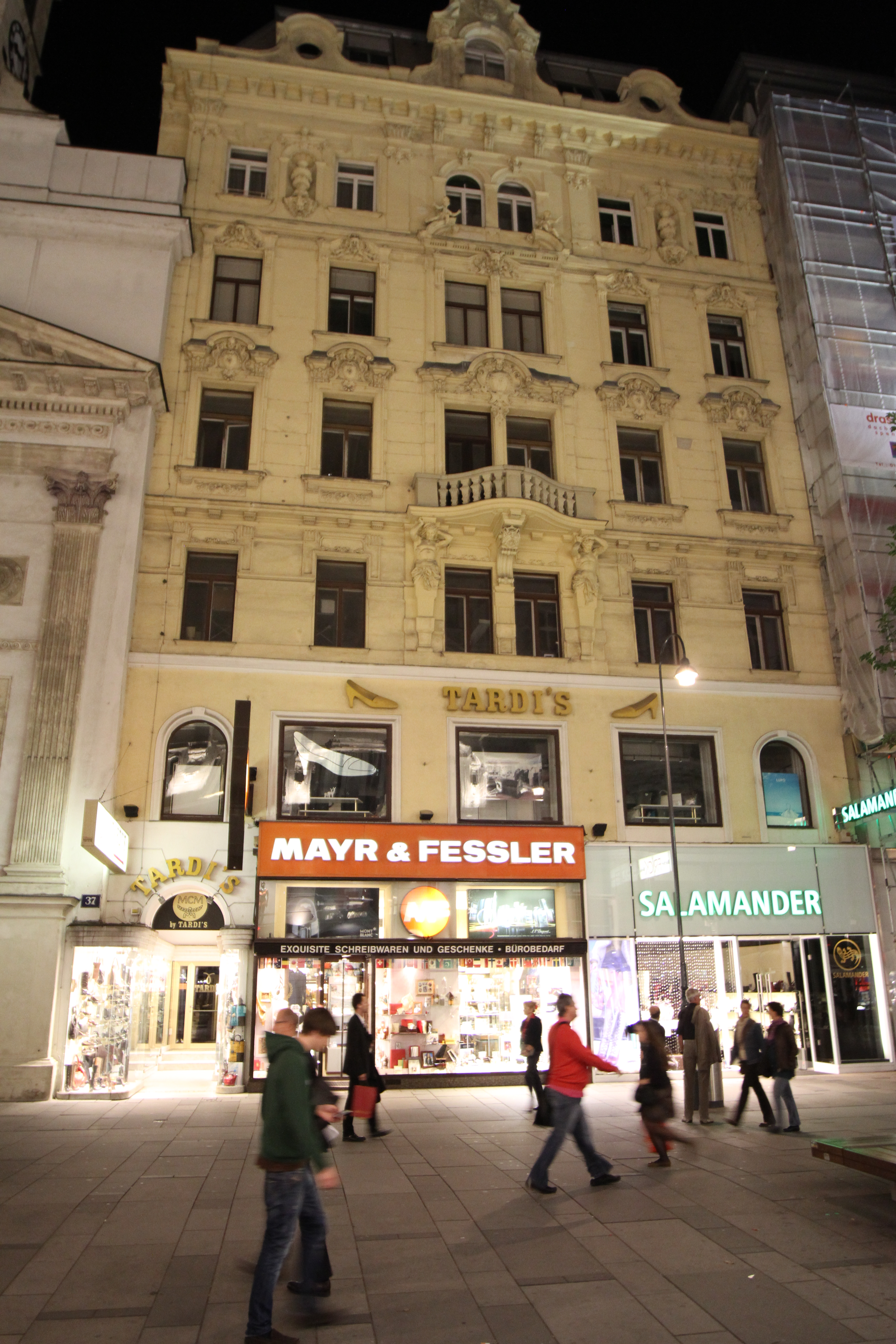 Wohn- und Geschäftshaus